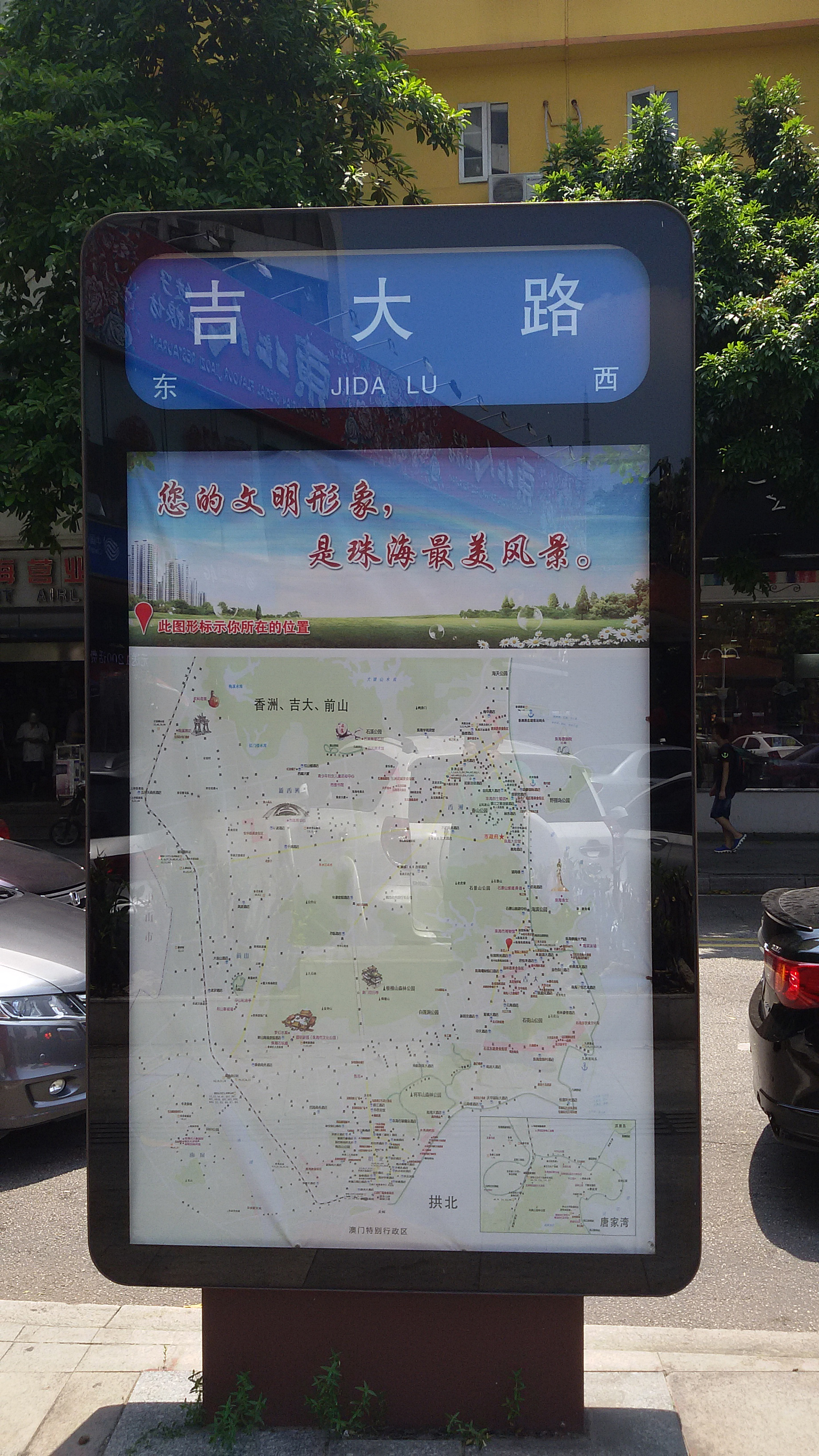 粵語: 吉大路嘅路牌